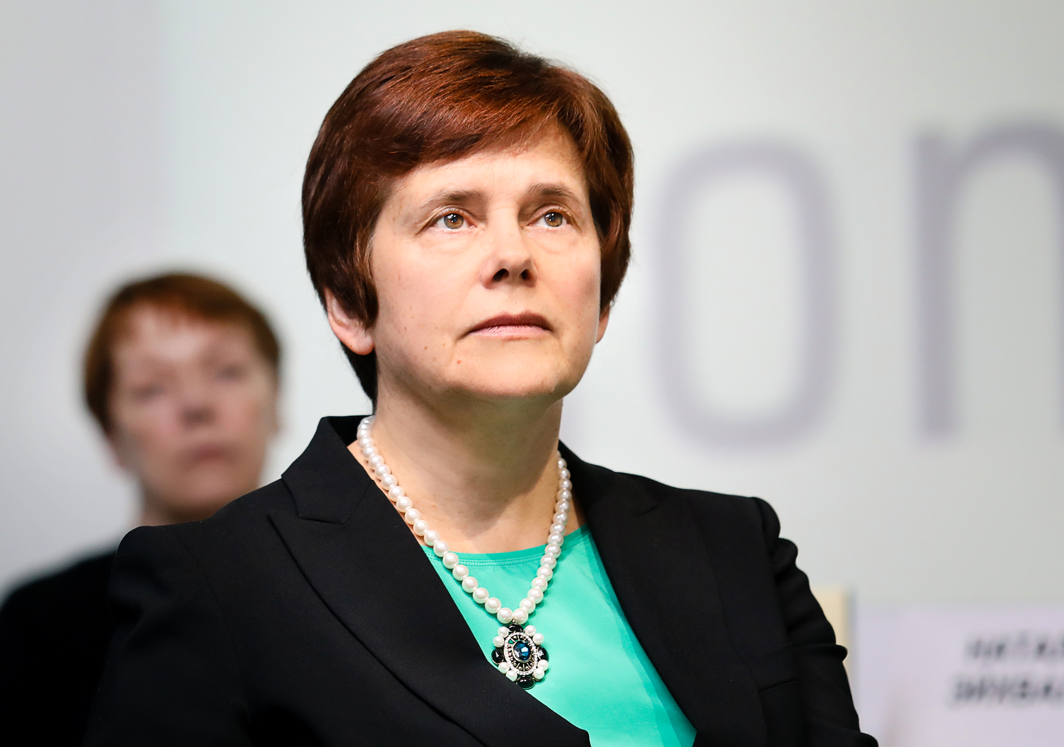 Российский литературовед Ирина Дмитриевна Прохорова на ярмарке нонфикшен №19 в Москве.